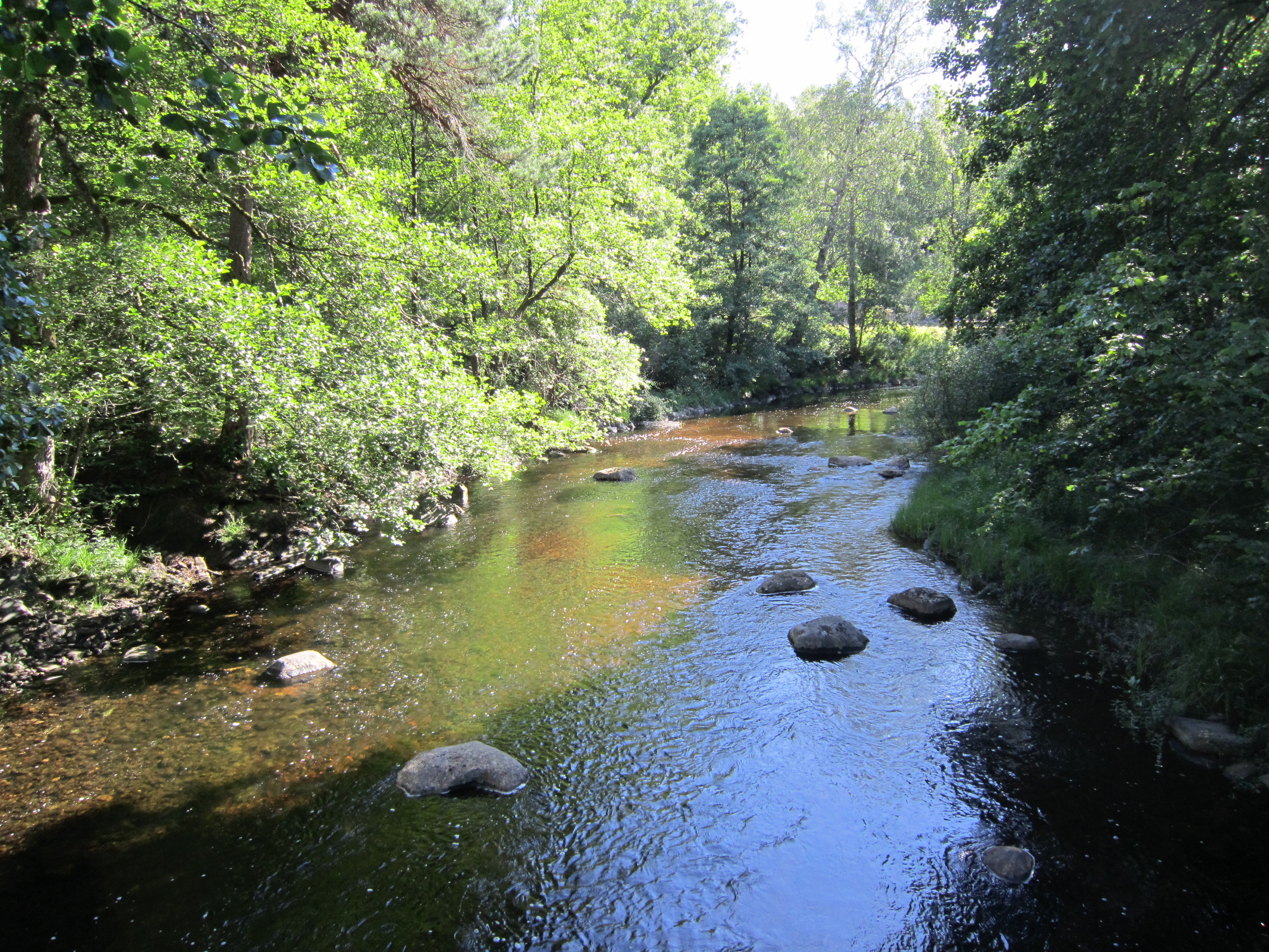 Kaldvellelva i Lillesand kommune